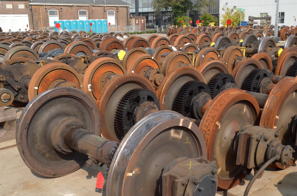 Hoofdwerkplaats Haarlem - Opslag Wielassen. Foto: Erik Swierstra.